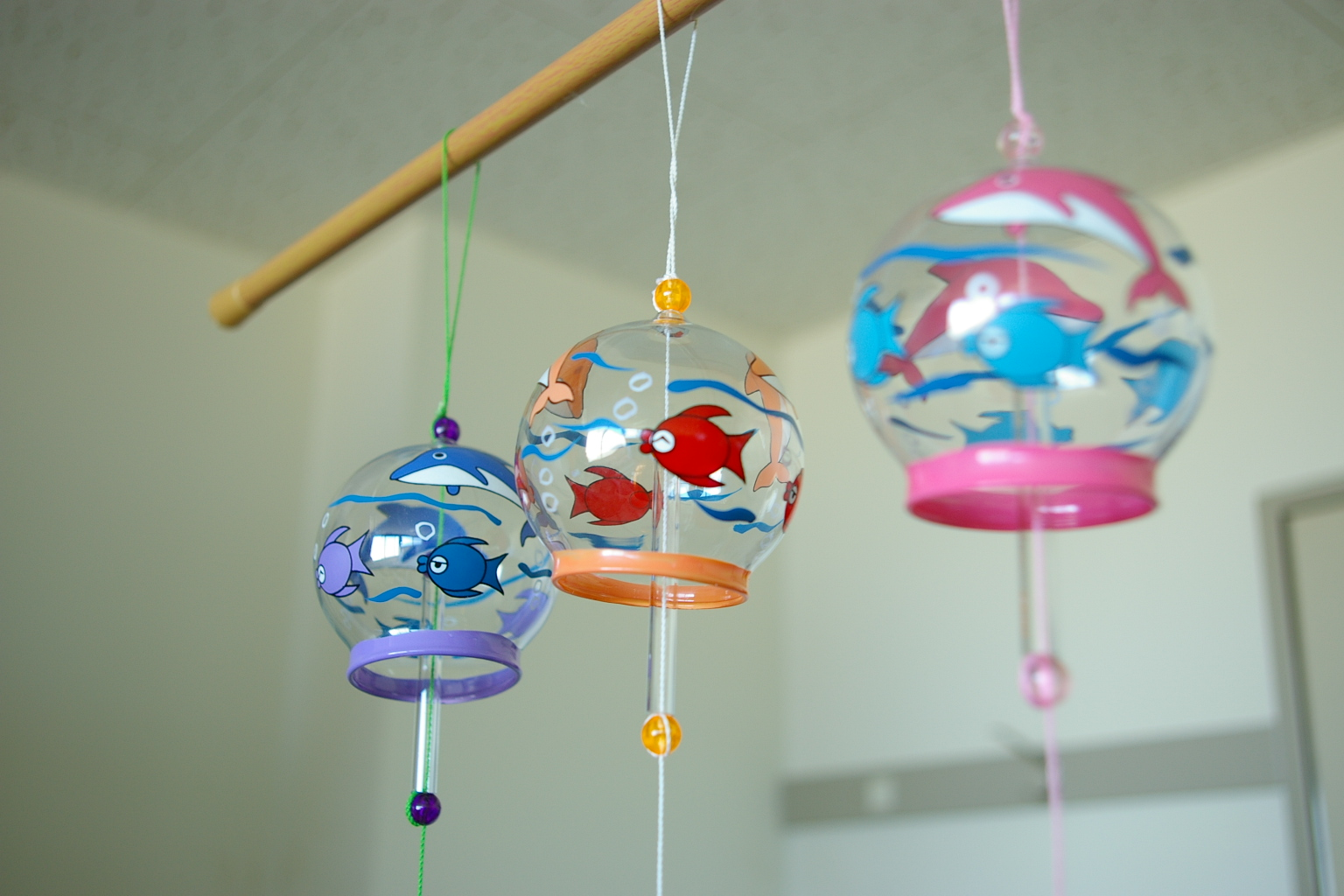 Glass windchime.